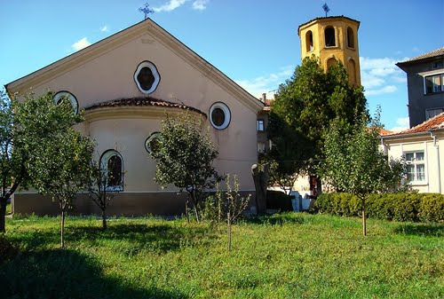 Църквата „Св. Арахангел Михаил“ в Пазарджик